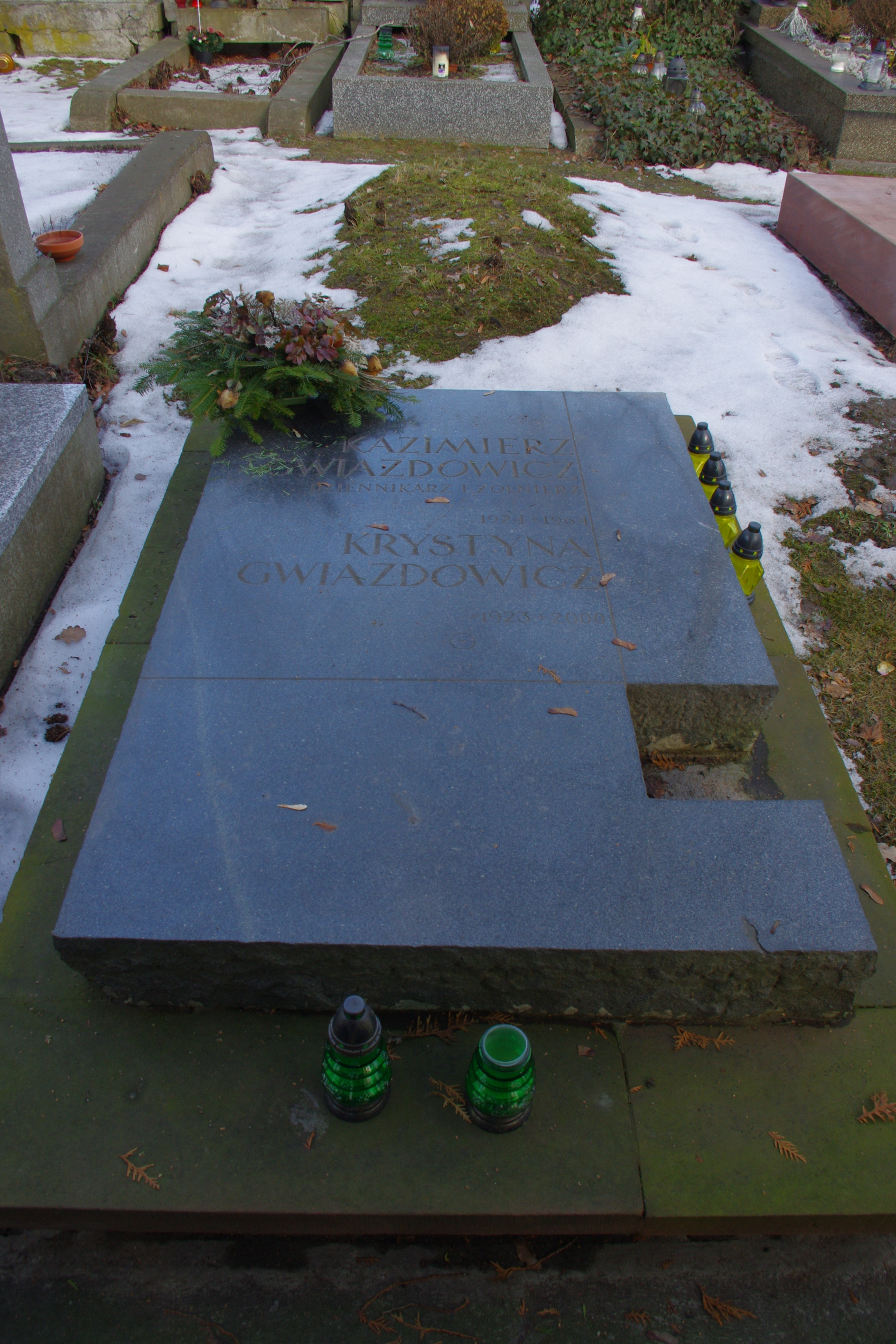 Grób partyzanta AL i dziennikarza Kazimierza Gwiazdowicza na Wojskowych Powązkach w Warszawie